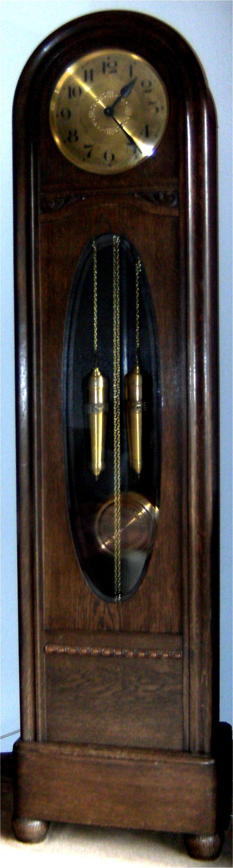 Standuhr von Gustav Becker